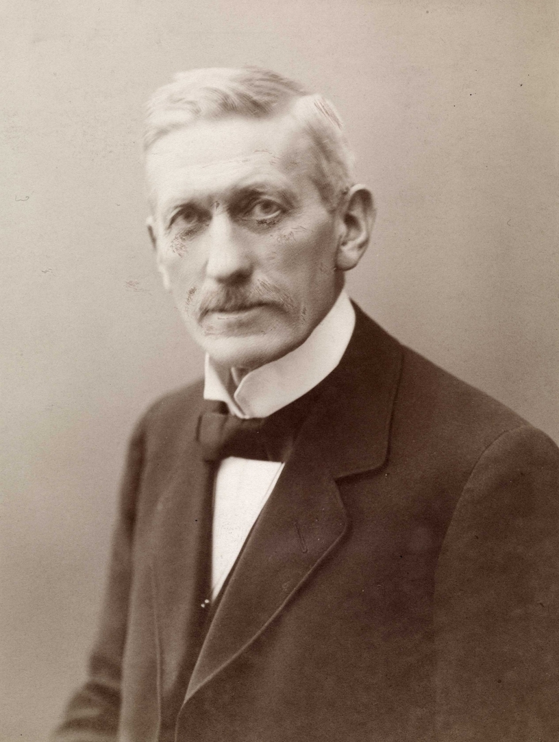 Christian Linthoe, arkitekt og bygningssjef i Kristiania. Ukjent fotograf, ca. 1900. Fra Byhistorisk samling hos Oslo Museum.